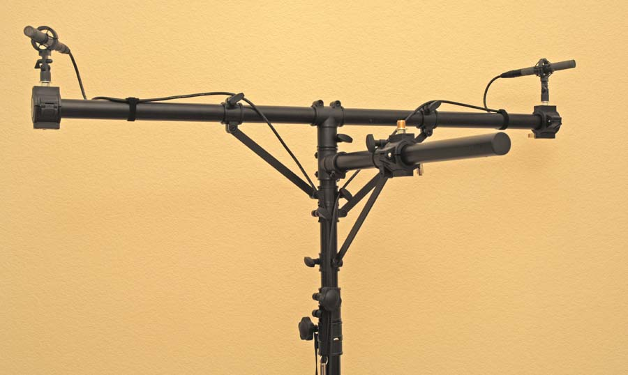 Toma estereofonica Decca Tree formada por 3 micros